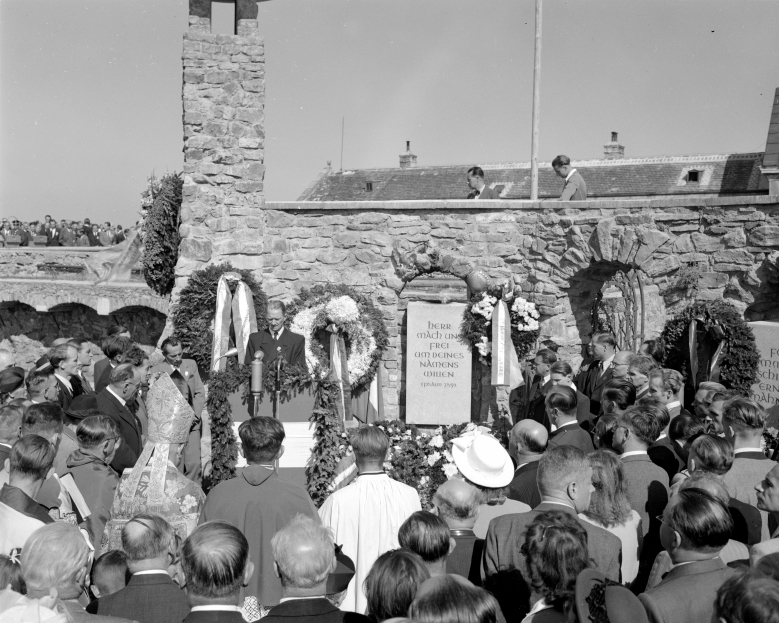 Enthüllung des Heimkehrer-Gedächtnismals am Wiener Leopoldsberg.